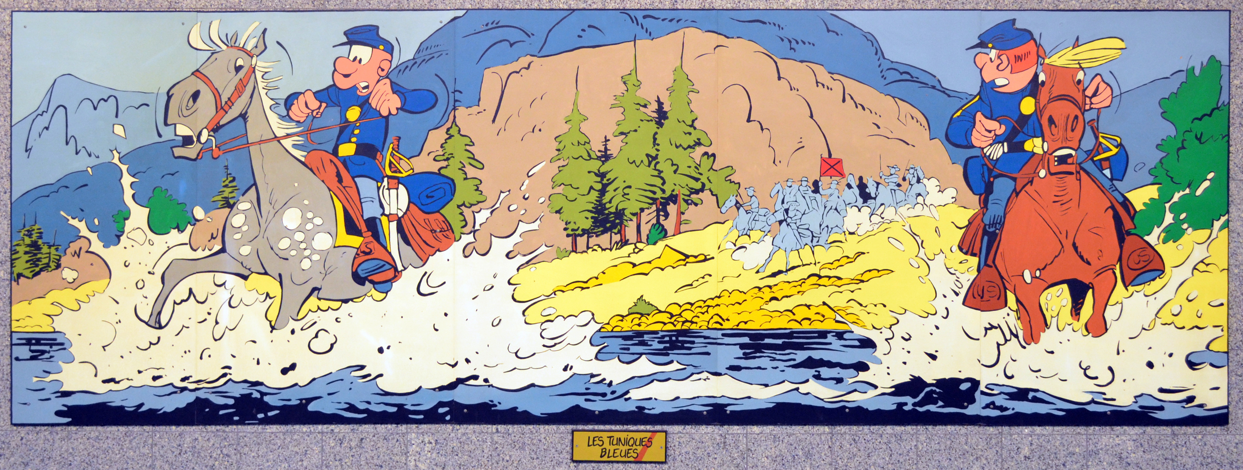 Charleroi (Belgique) - Station Janson du métro léger. Les Tuniques bleues.